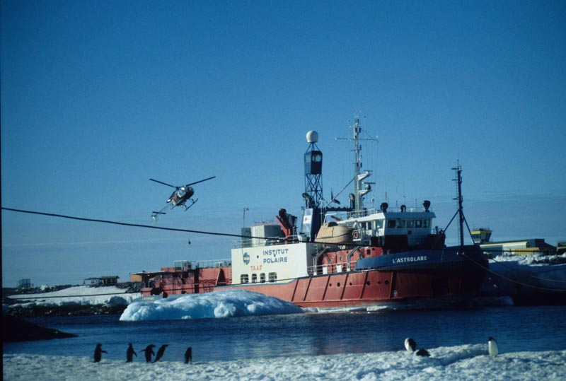 Das französische Forschungsschiff L’Astrolabe hat bei der Forschungsstation Dumont d’Urville angelegt. Die Waren werden per Helikopter zur Forschungsstation transportiert.